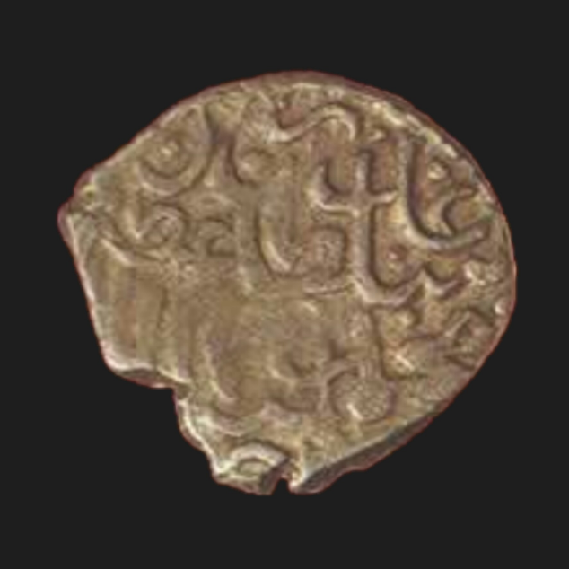 Ağqoyunlu, Məhəmməd təngə, gümüş